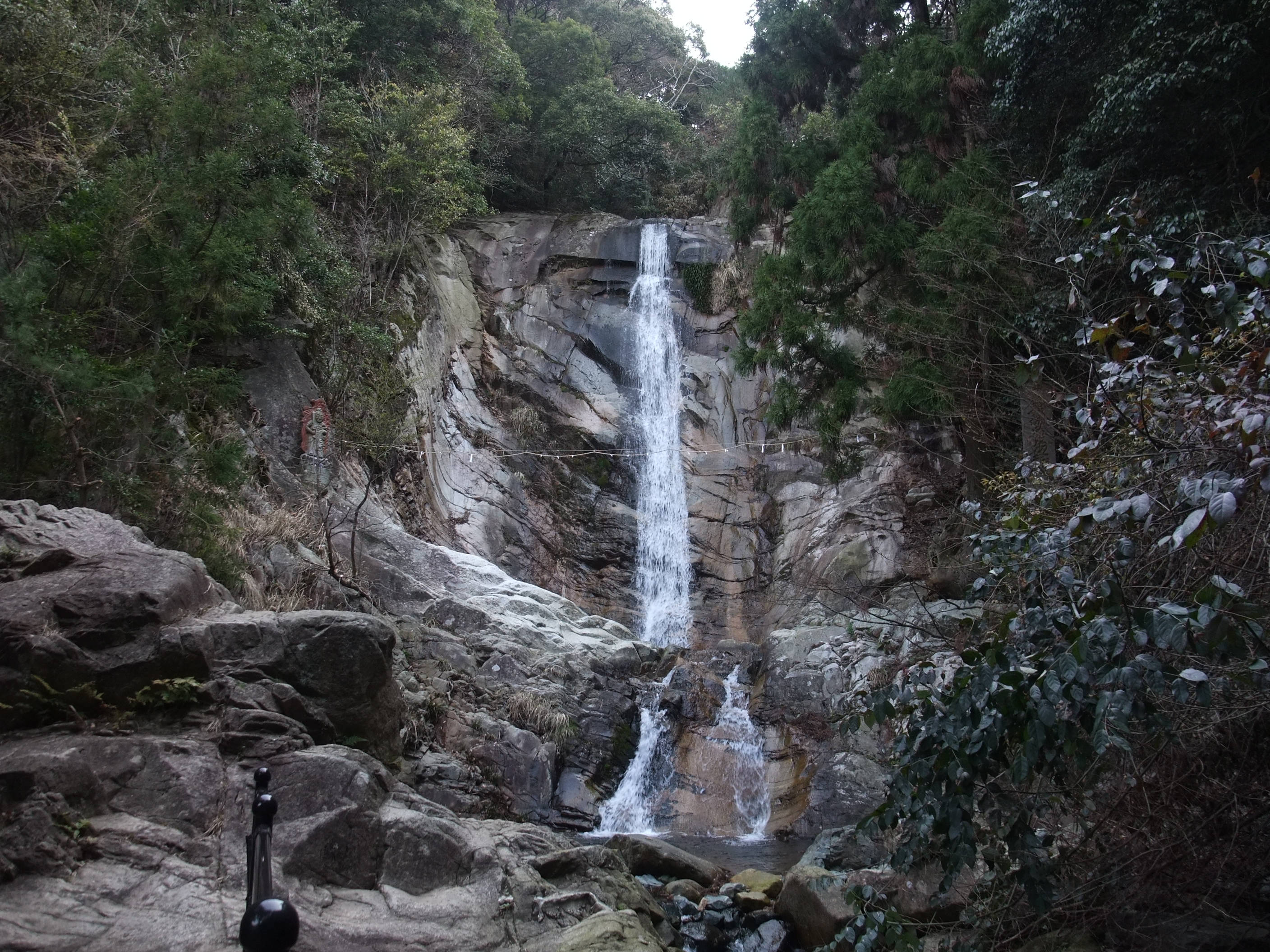 上野峡白糸の滝